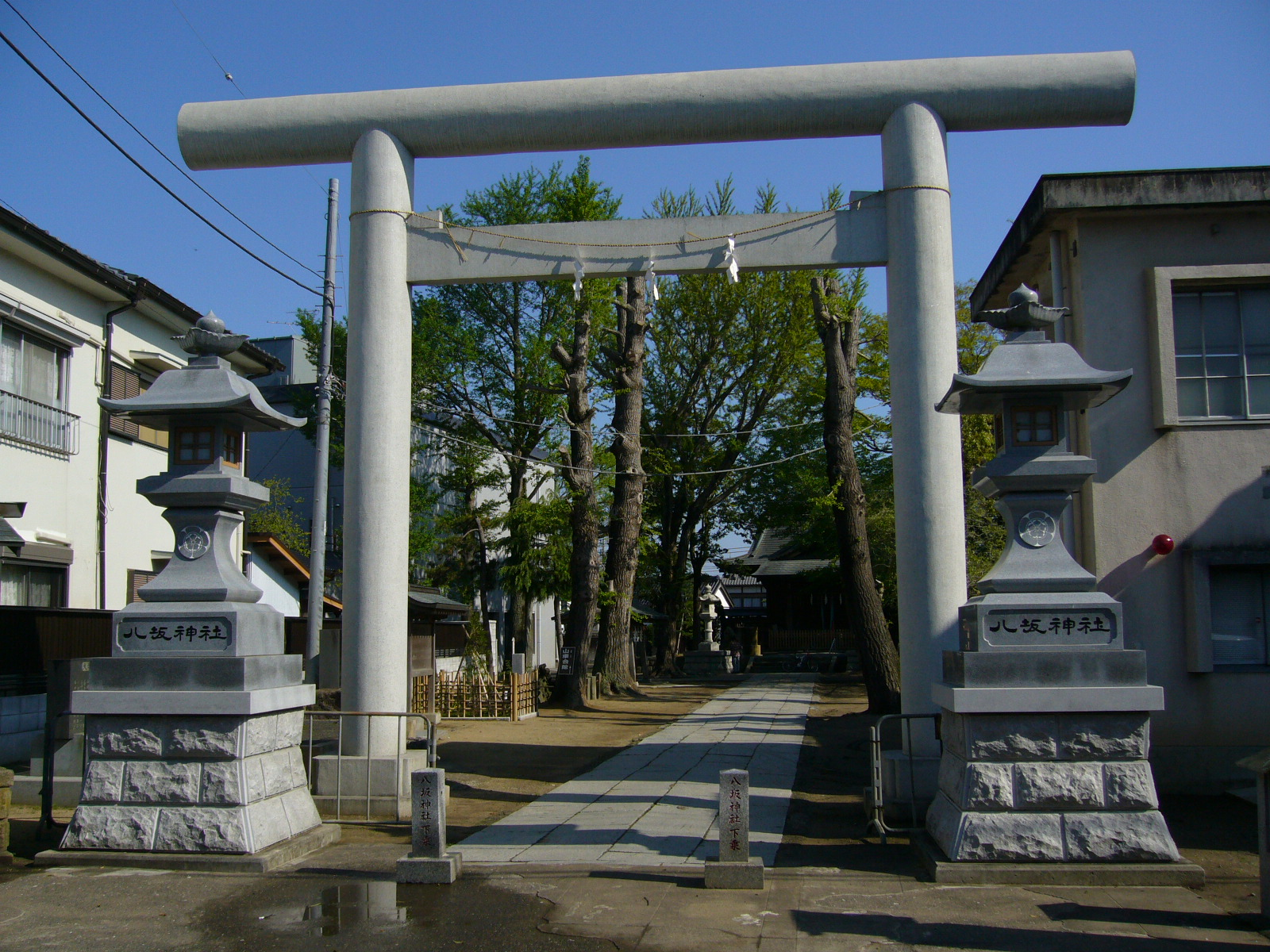 yasaka-jinjya-shrine-entrance sawara,katori-city,japan